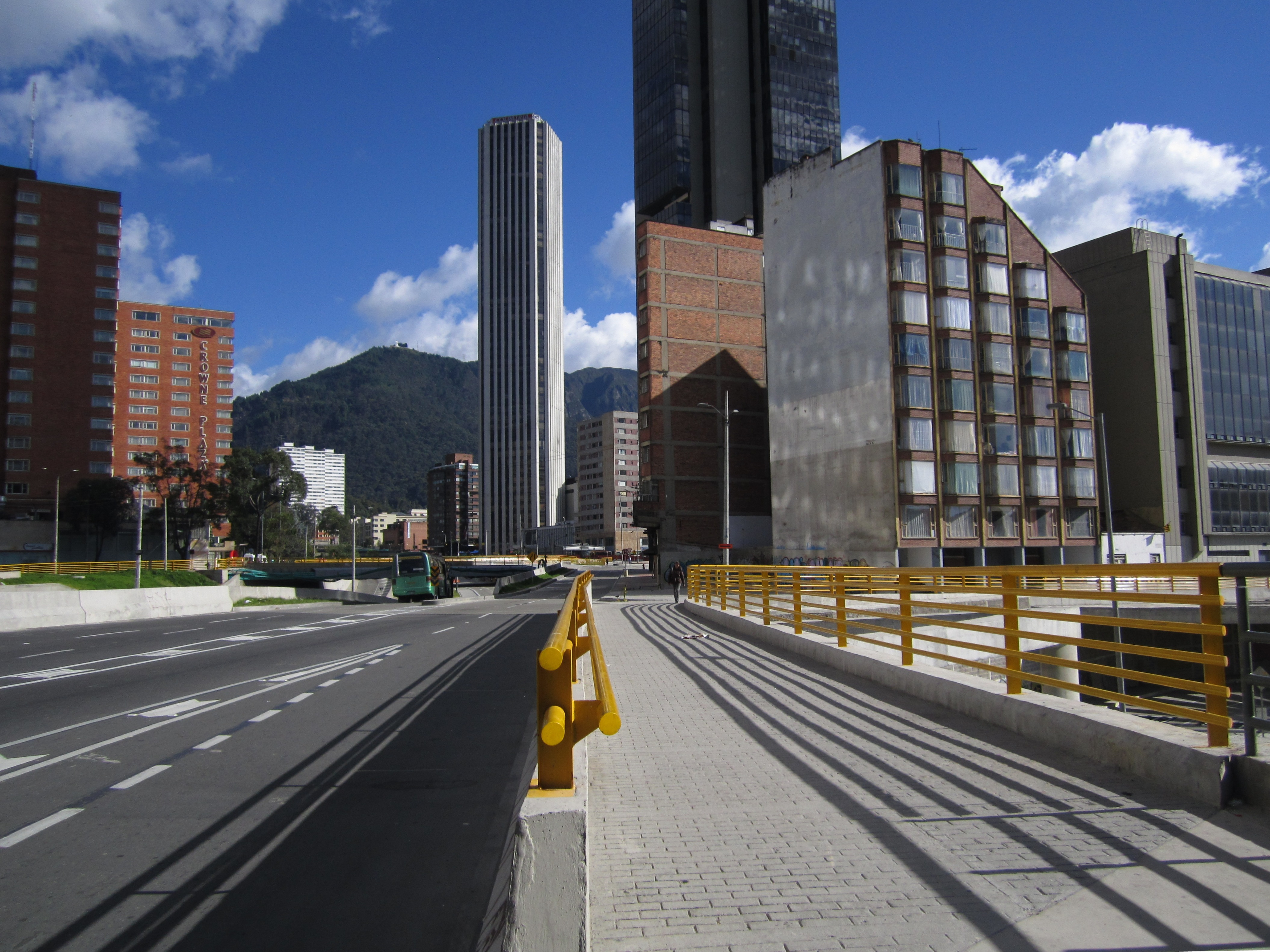 Centro de Bogotá desde la avenida 26 con carrera 13 A. Barrio La Alameda y al fondo torre Colpatria.